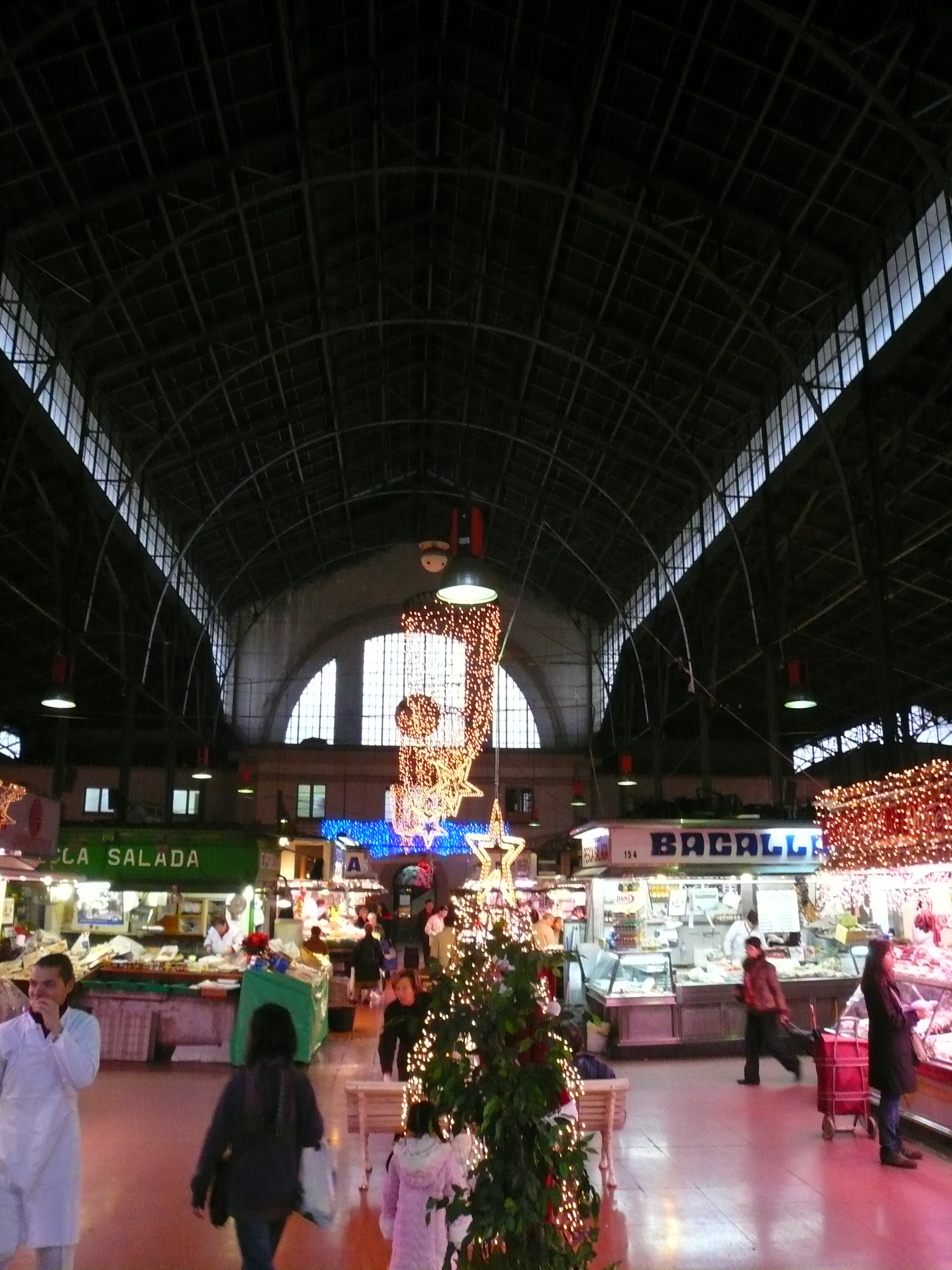 Interior del Mercat del Ninot abans de les actuals obres de reforma. C. Mallorca, 133-157 (Barcelona). Object location41° 23′ 16.22″ N, 2° 09′ 15.93″ E